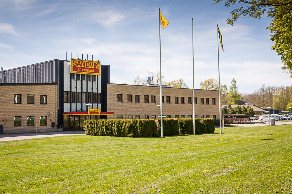 Entré till Sandvik Coromant i Gimo.